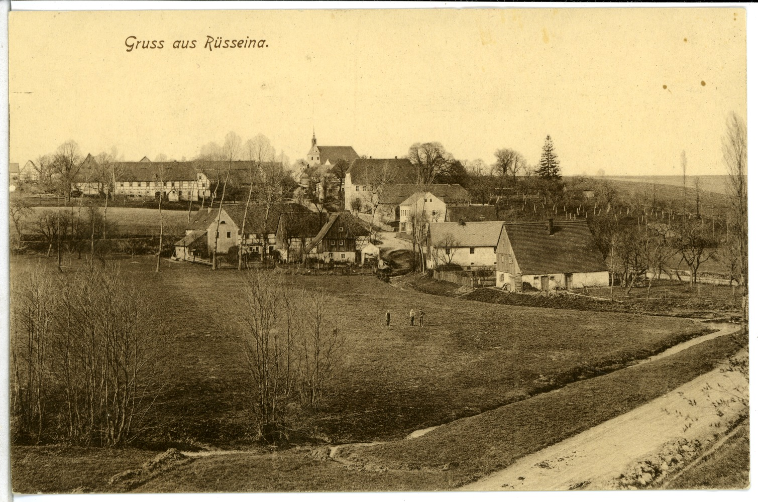 Rüsseina; Blick nach Rüsseina This postcard is from publisher Brück & Sohn in Meißen ( postcard has a unique number 04563 and is available in a higher resolution at the publisher. This images was uploaded in a cooperation project between Wikipedians and the publisher.